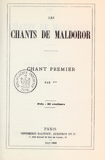 Couverture de l'édition originale du PREMIER CHANT des Chants de Maldoror, publié anonymement par Isidore Ducasse en août 1868 à Paris chez l'imprimeur [Gustave] Balitout, Questroy et Cie.